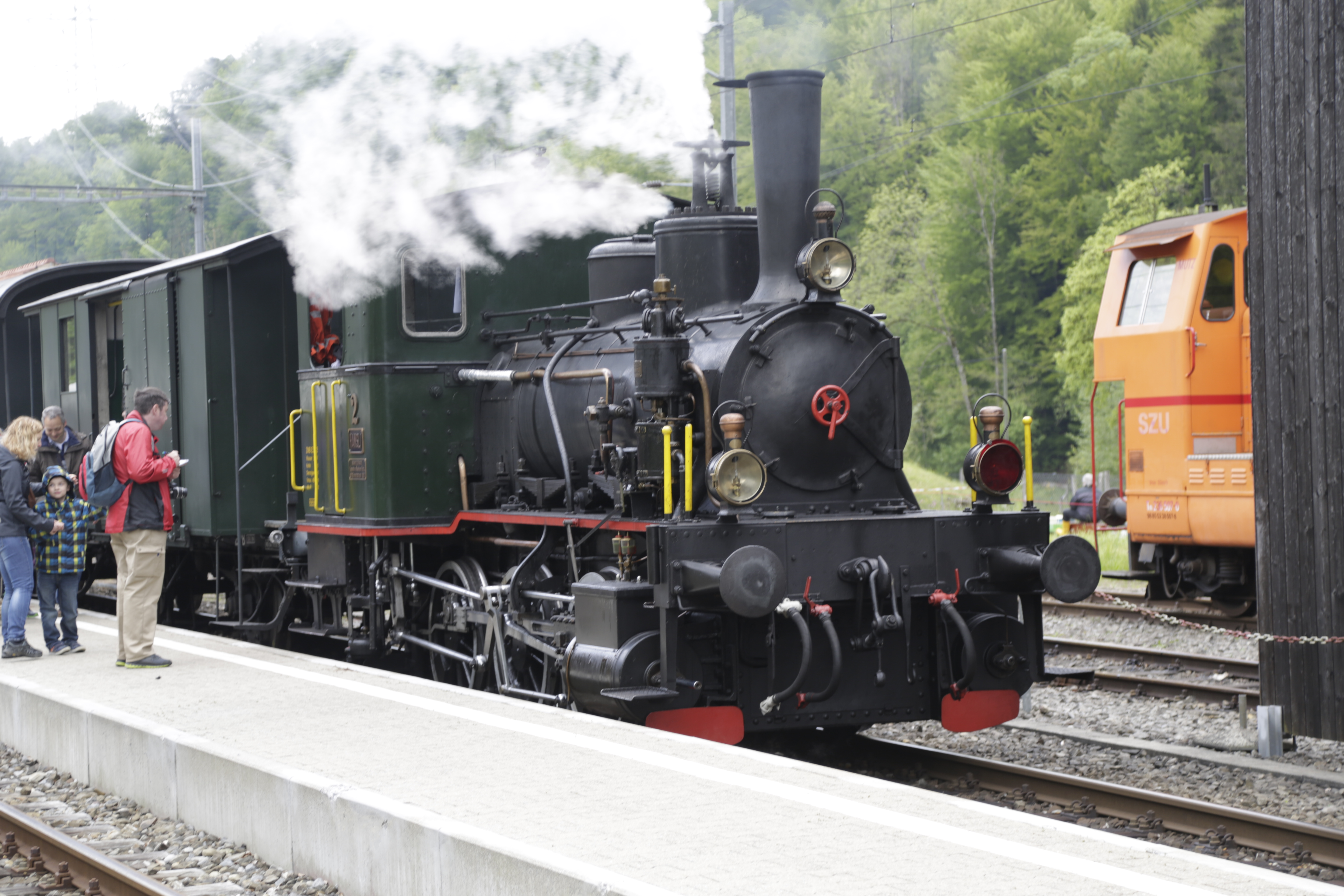 Die E 3/3 Nummer 2, ist als betriebsfähige Lokomotive bei der Zürcher Museumsbahn erhalten